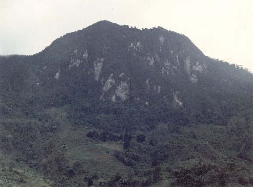 Pennas Blancas